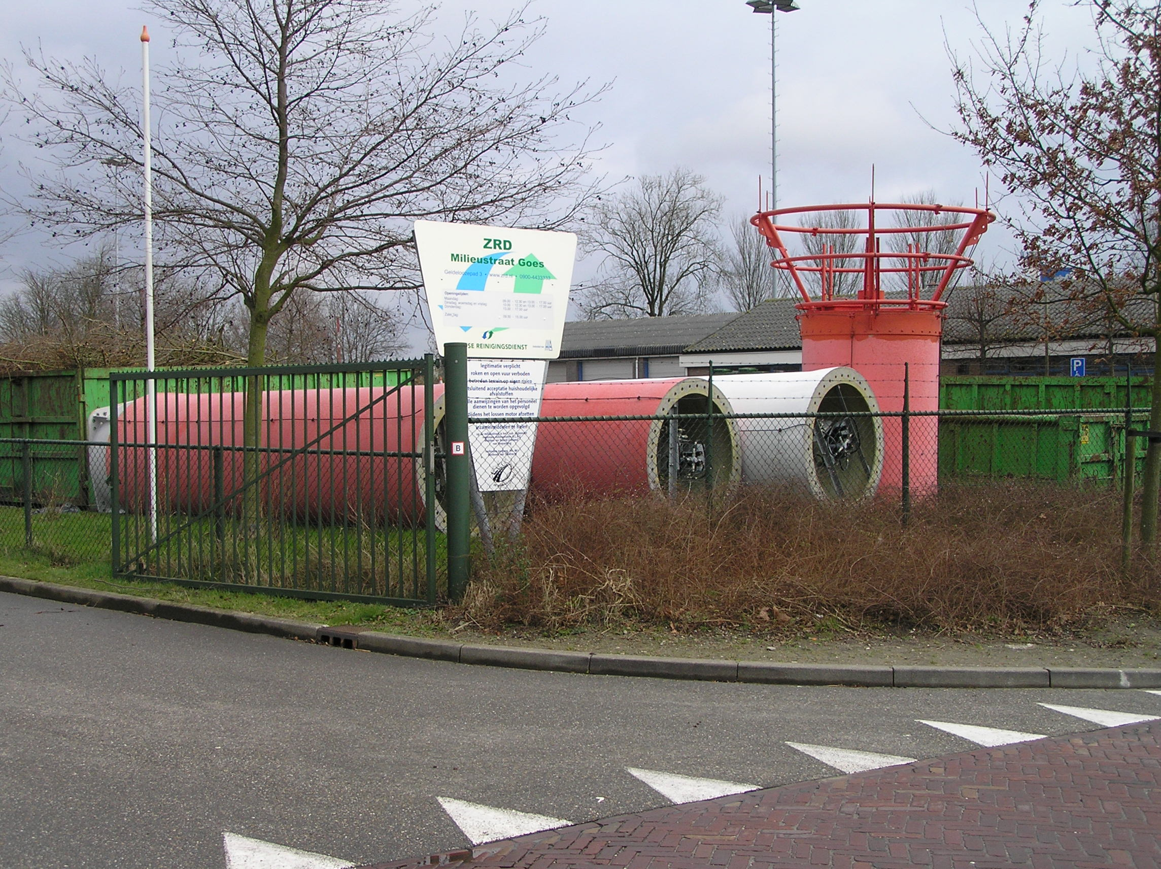 Restanten van de oude antenne van de TV-toren in Goes